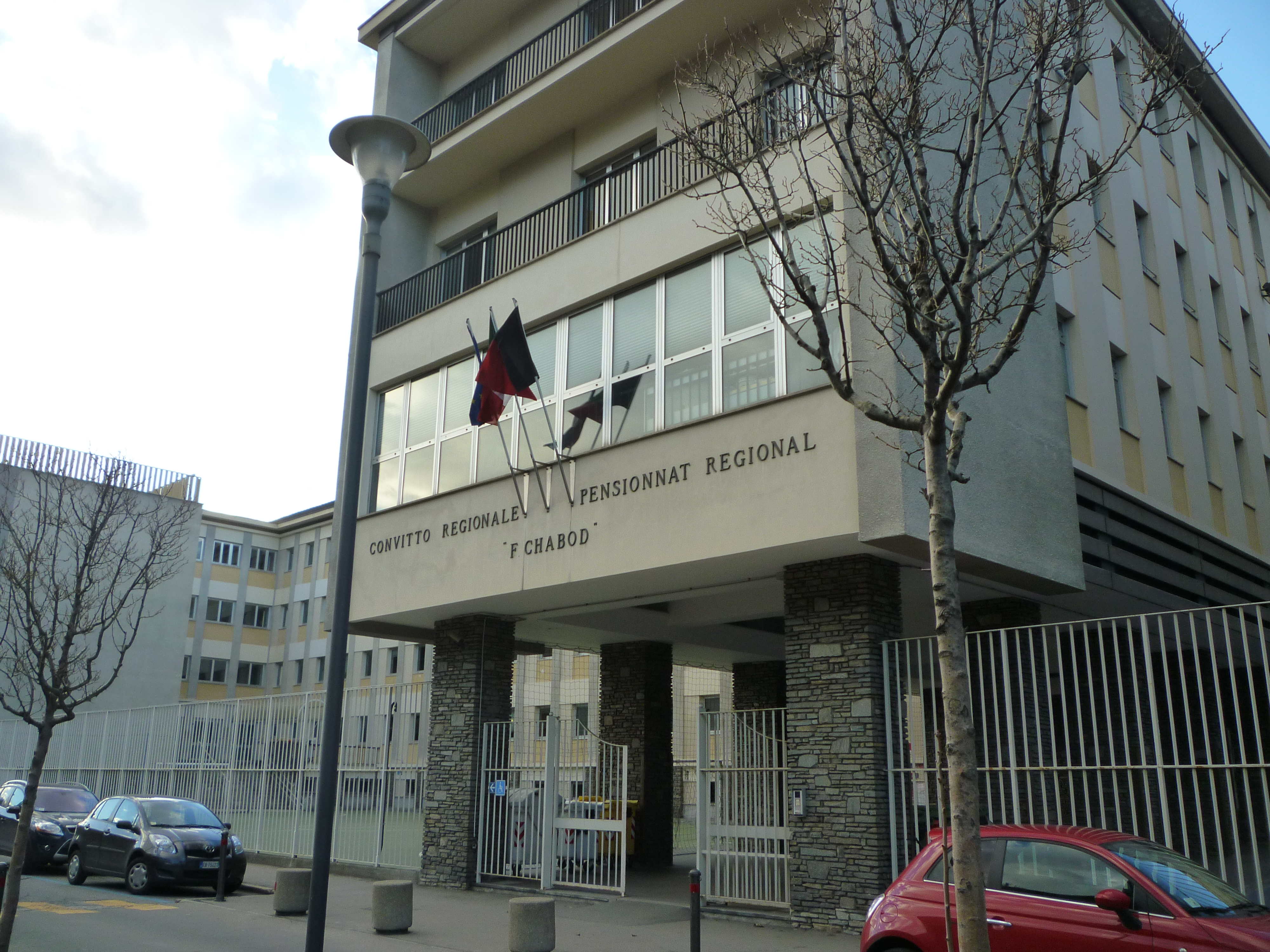 Le pensionnat régional Frédéric Chabod à Aoste (Vallée d'Aoste - Italie)